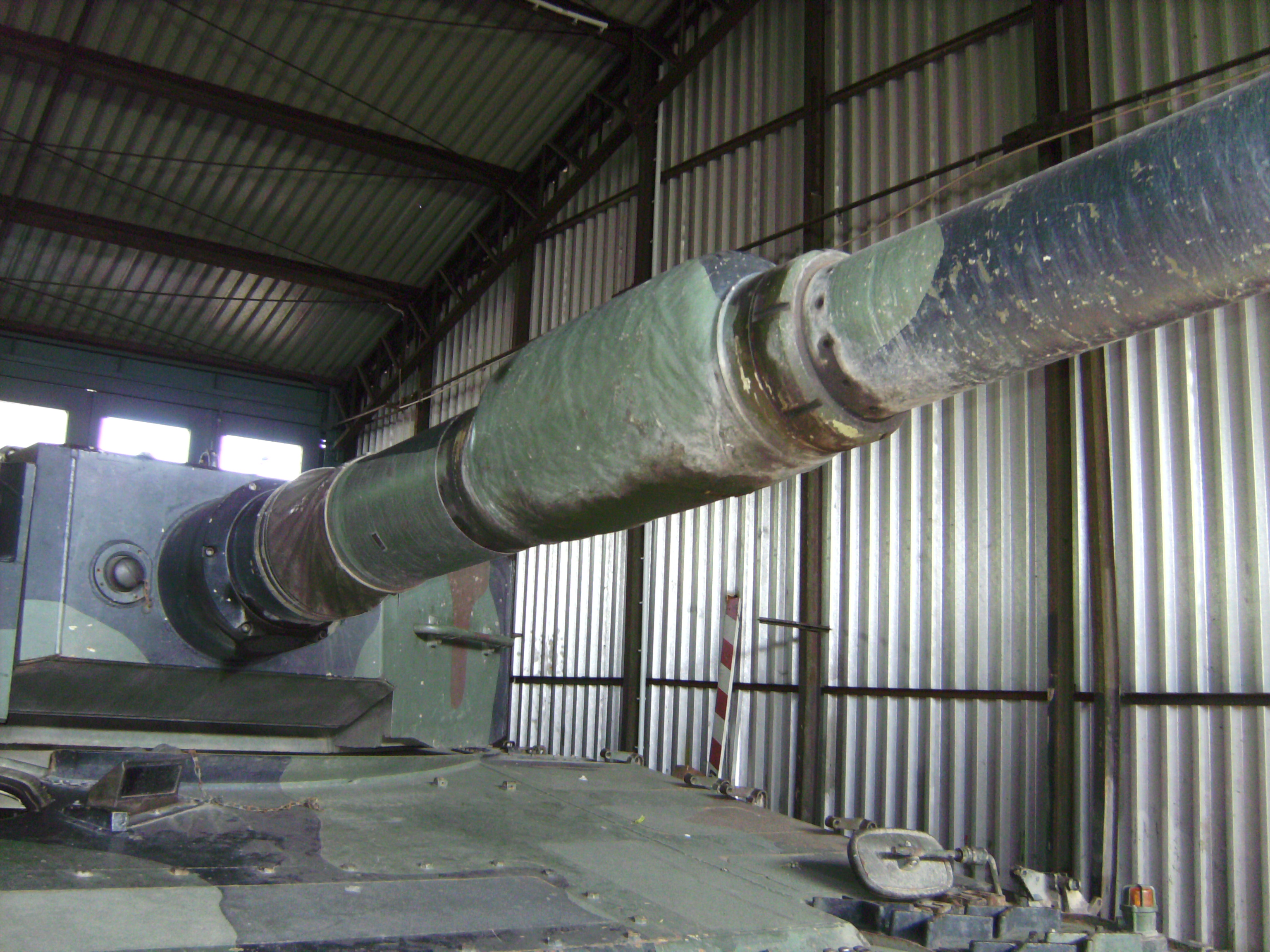 Rauchabsauger Leopard 2A4